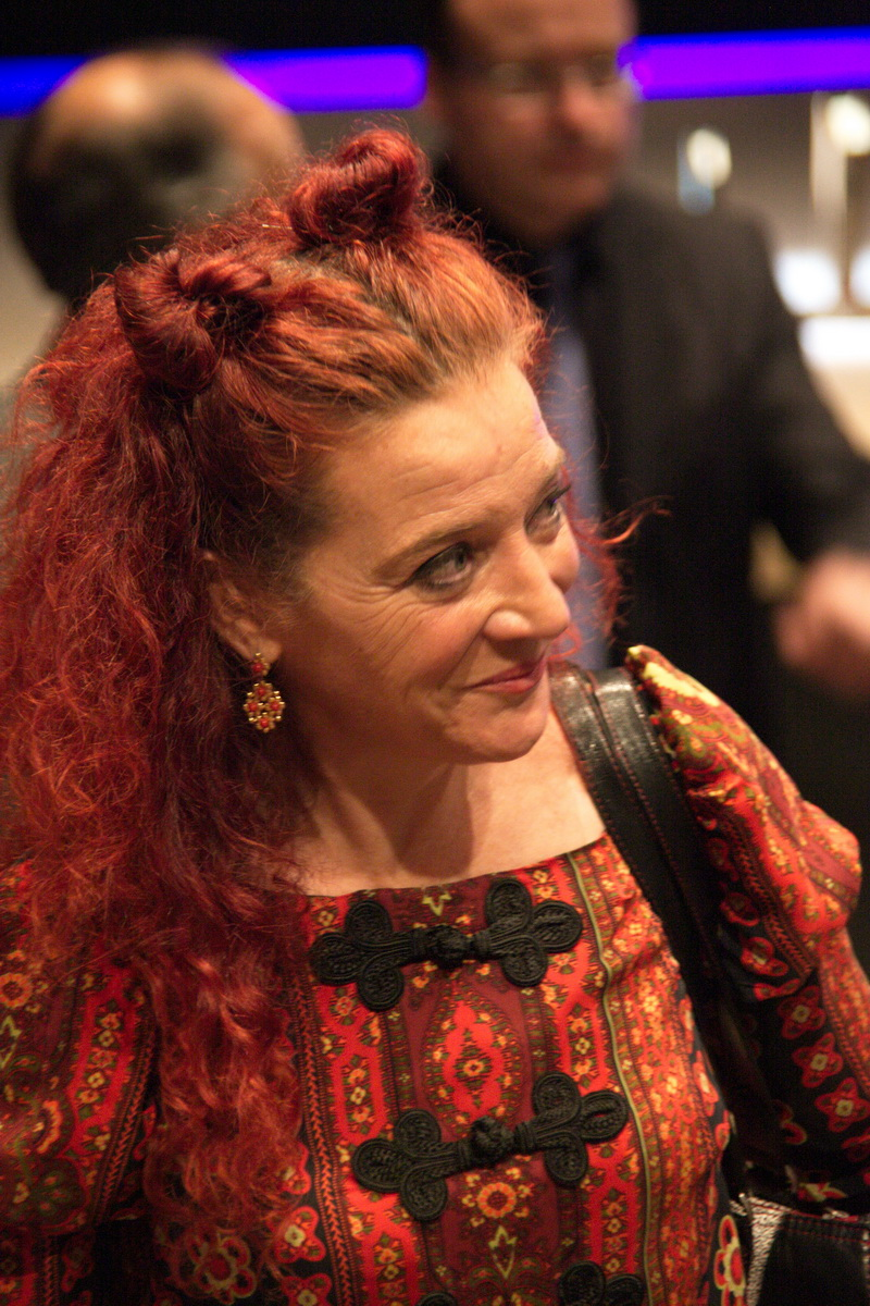 Pepa Plana en el lliurament dels Premis Nacionals de Cultura de Catalunya 2014. Santa Coloma de Gramenet, 2 de juny de 2014.